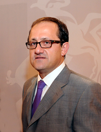 Harald Beyer Burgos